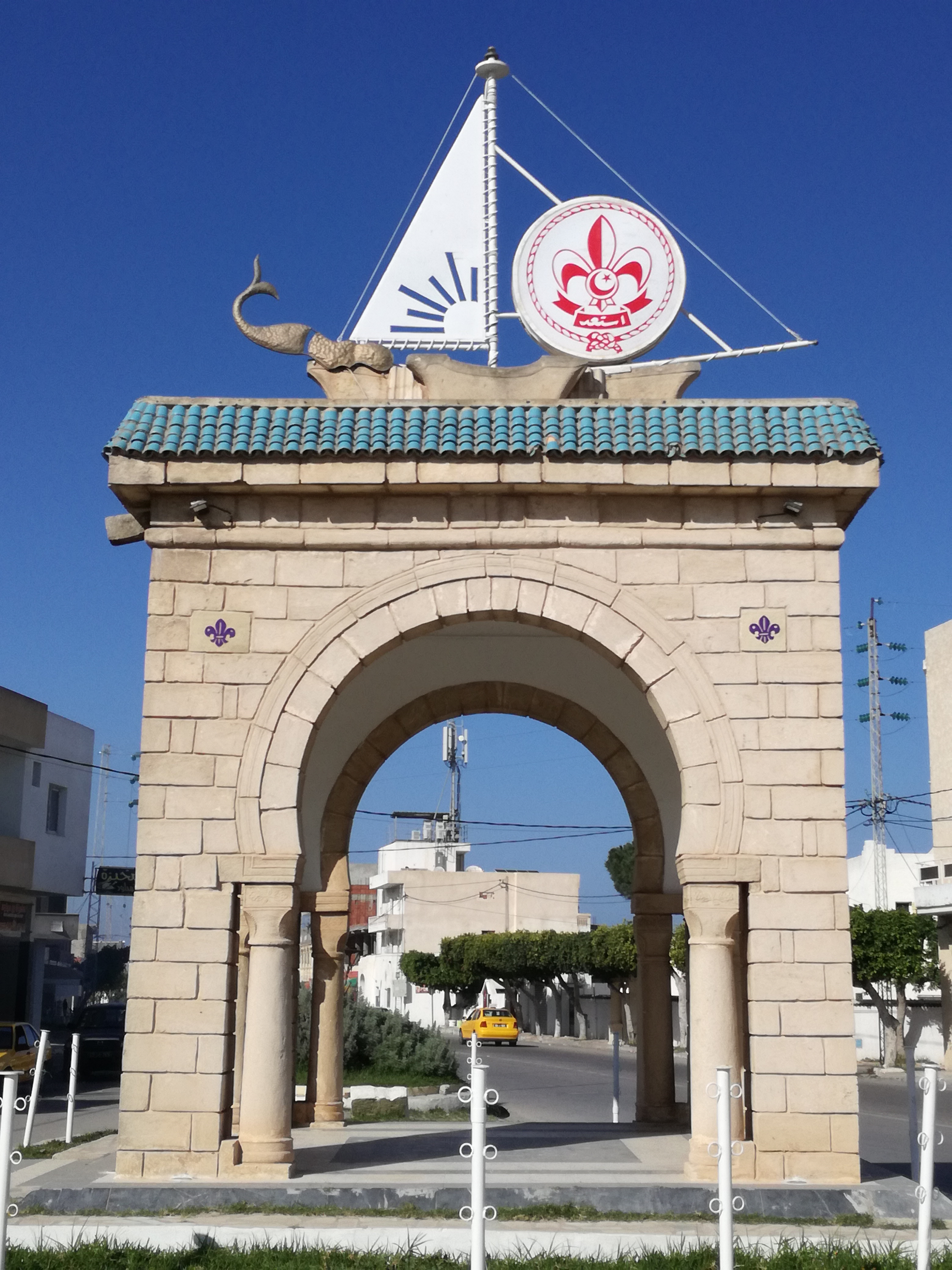 Monument emblématique Rejiche-Mahdia Tunisie